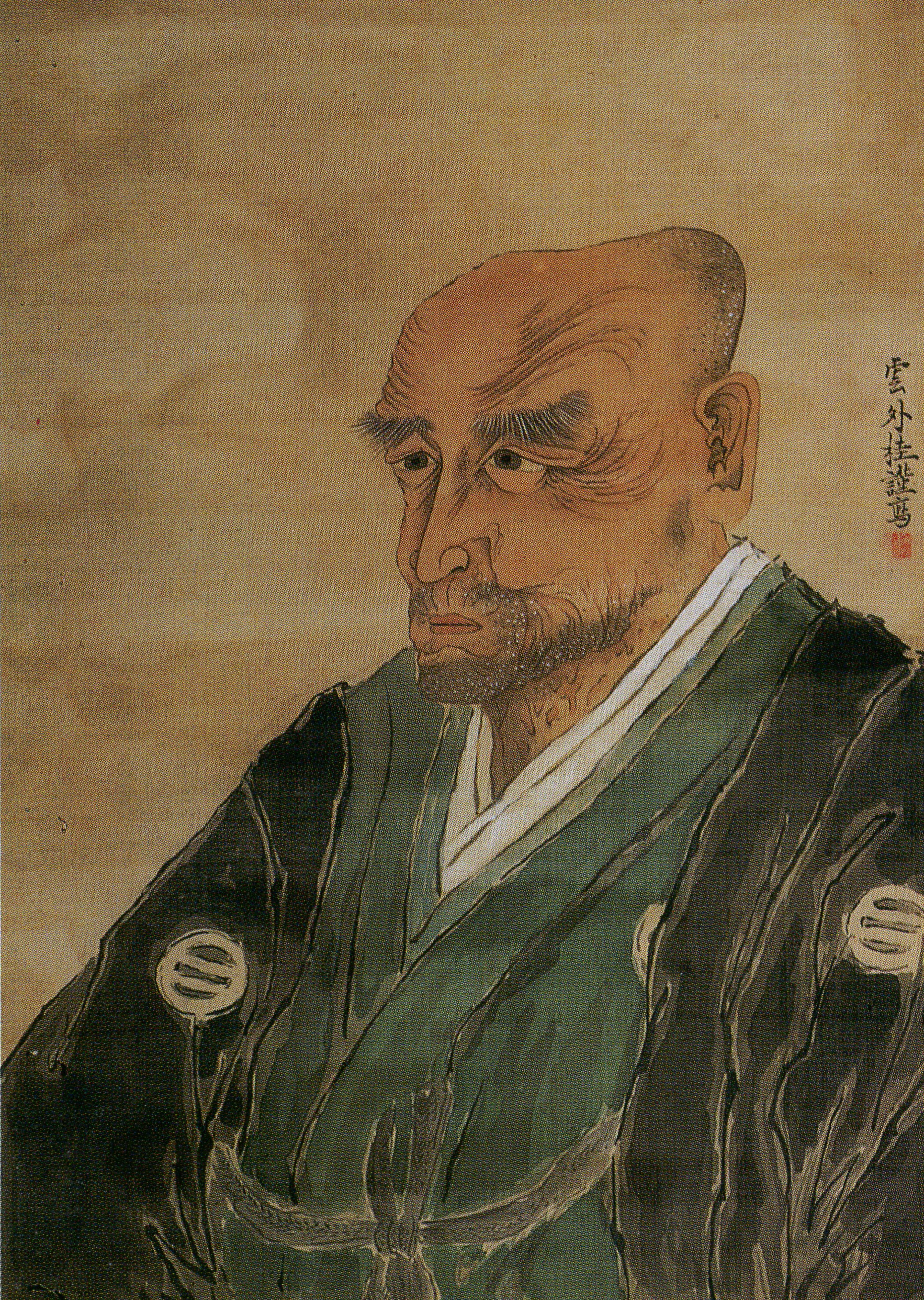 寺門静軒の肖像。